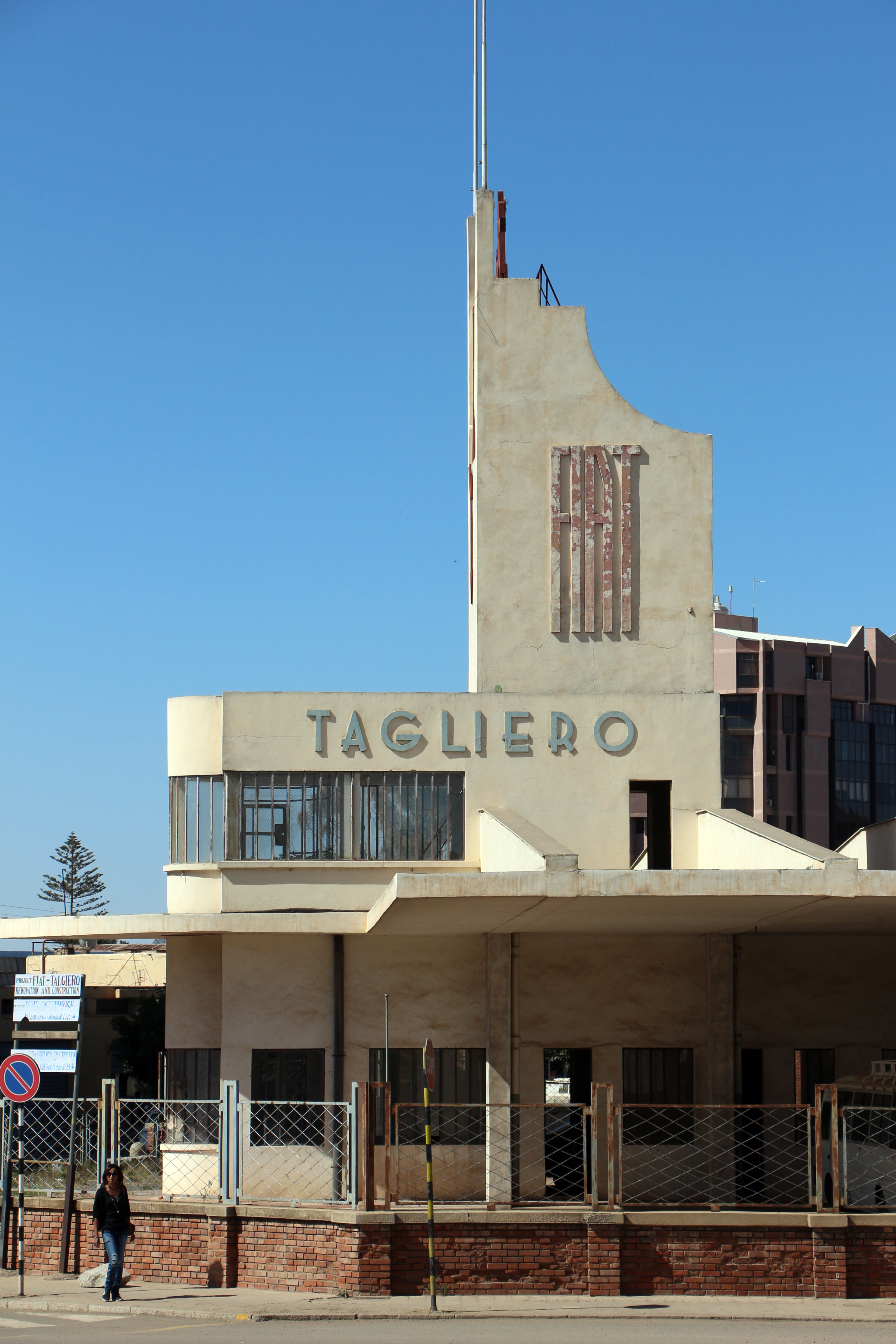 Fiat tagliero, 13.JPG